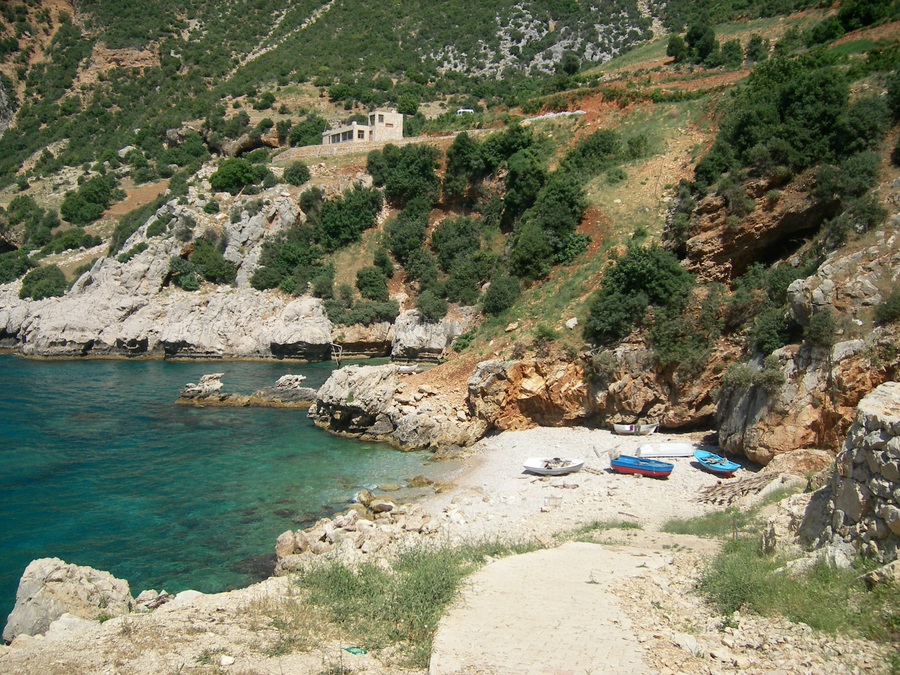 Yayladağı'nın deniz kıyısındaki Kara Mağara bölgesi